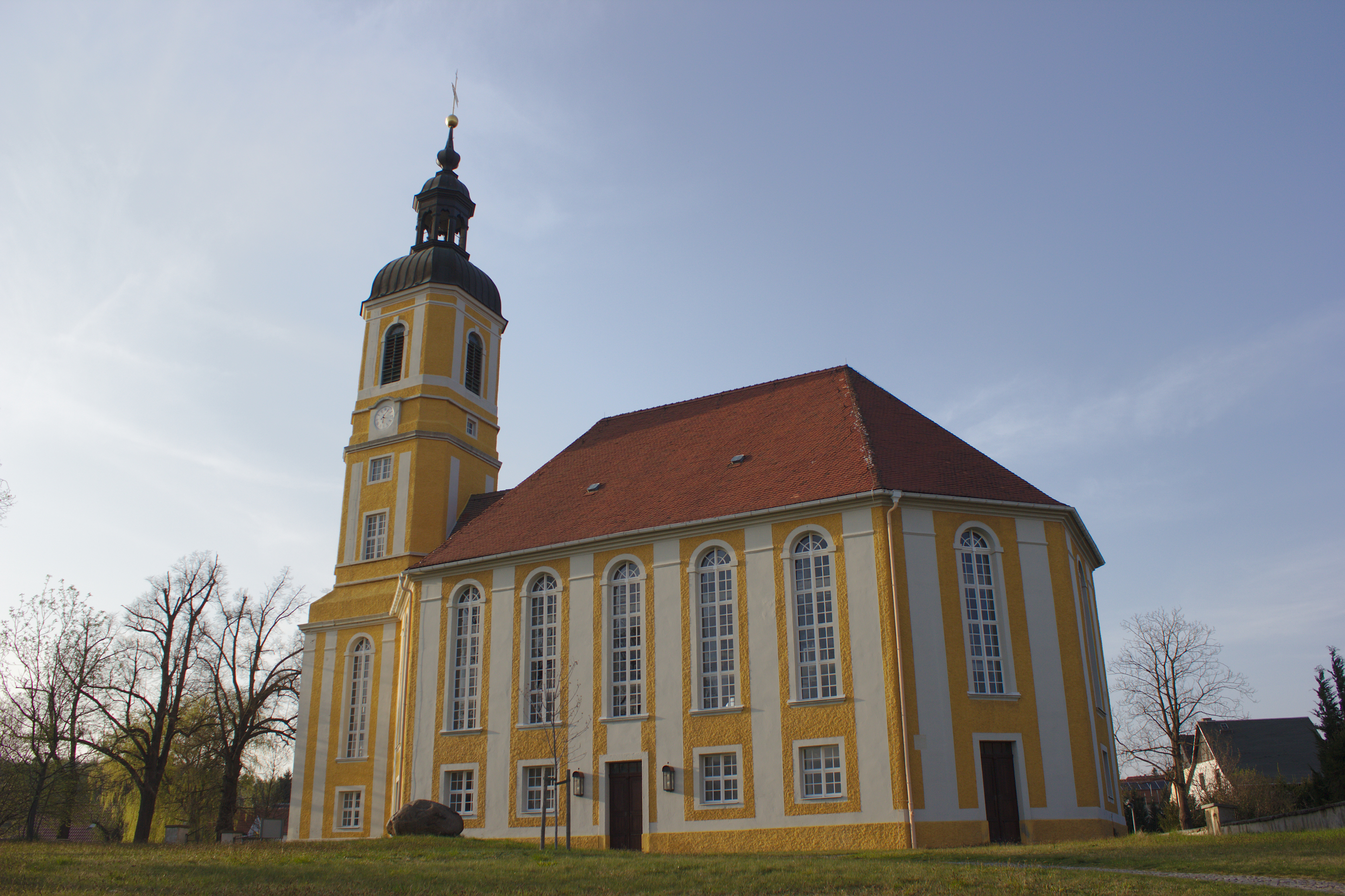 Hornjoserbsce: Wóslinčanska ewangelska cyrkej.